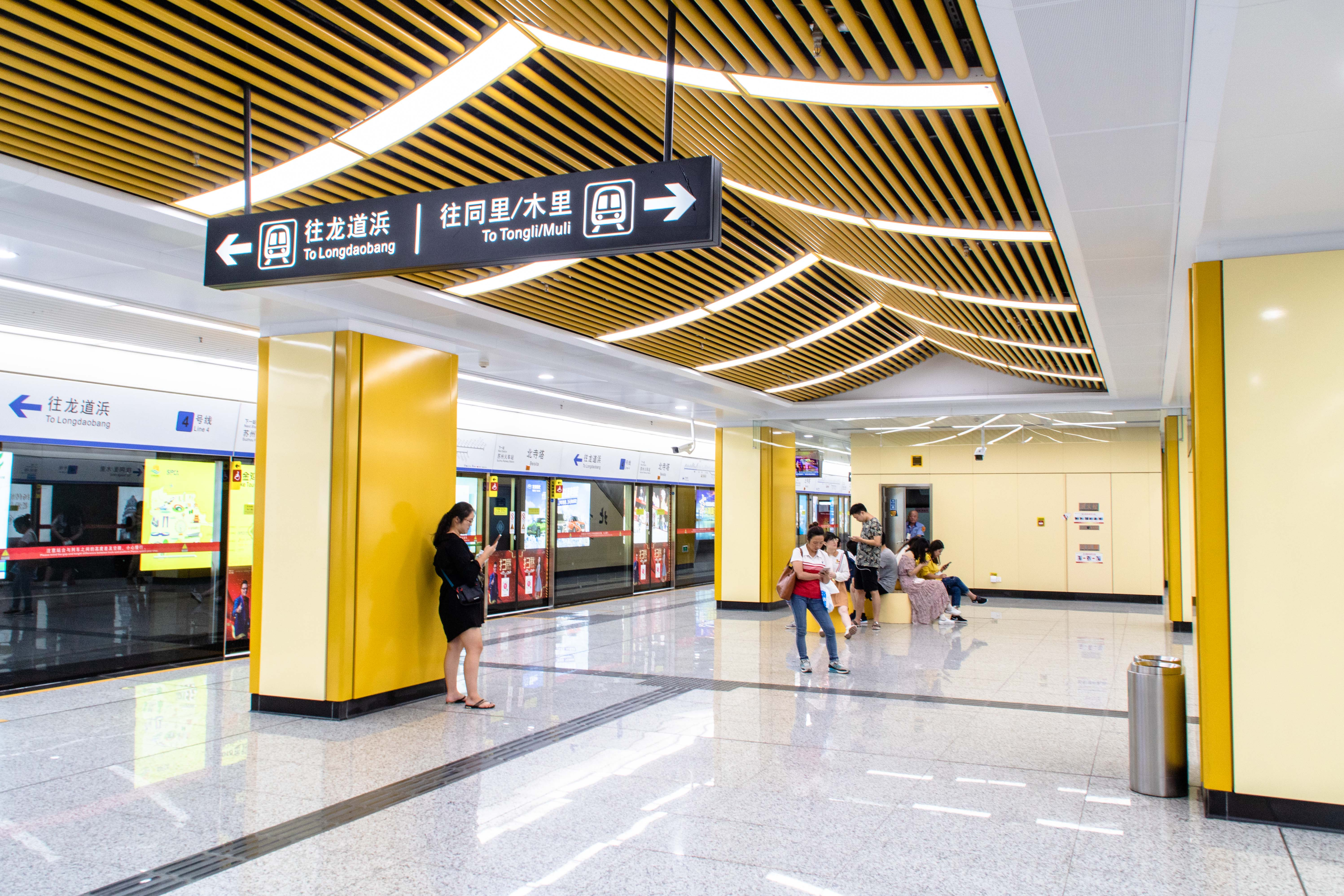 北寺塔站站台